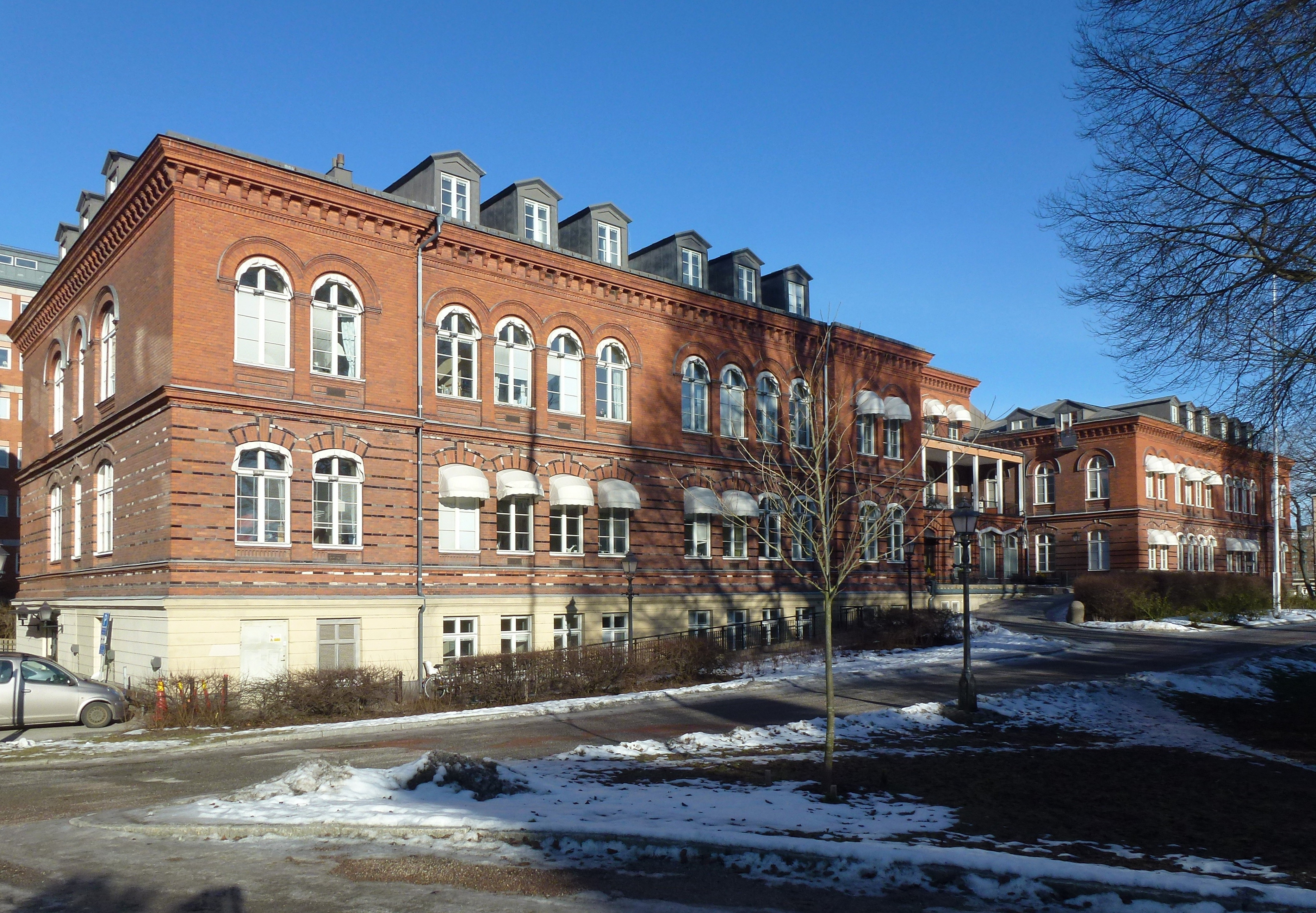 Serafimerlasarettet huvudbyggnad